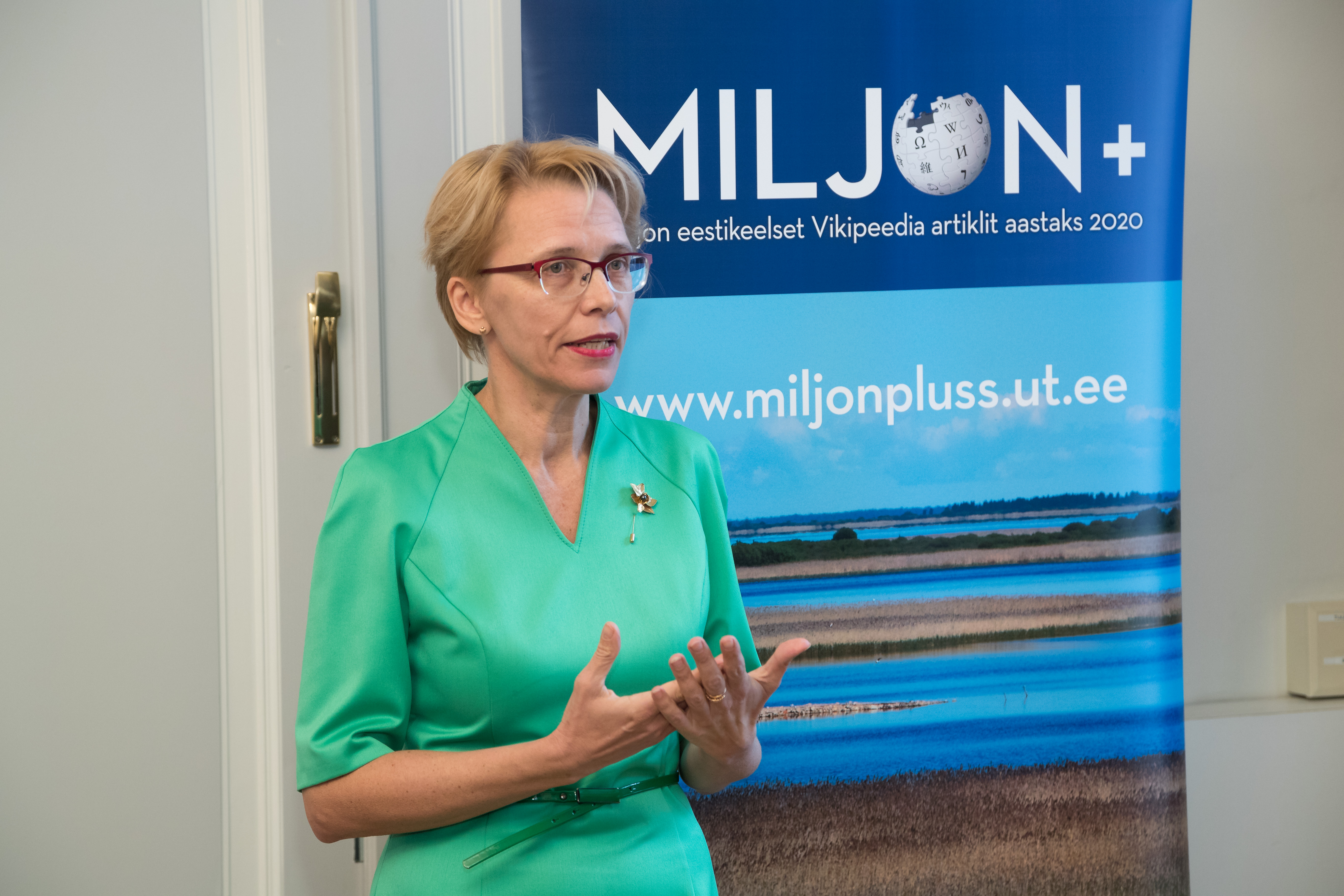 Vikipeedia digihariduse konkursi stipendiaatide premeerimine Tartu Ülikooli nõukogu saalis. Tartu ülikooli õppeprorektor professor Anneli Saro.